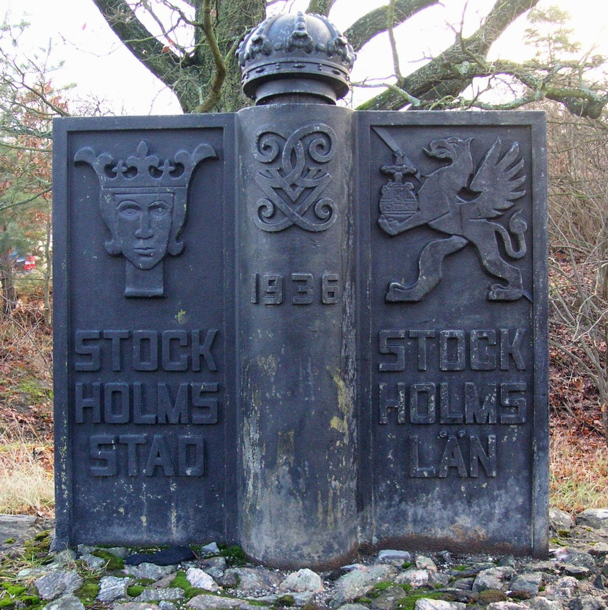 Gränsskylt mellan Stockholms och Huddinge kommun, vid Gamla Södertäljevägen på gränsen mellan Segeltorp och Fruängen (RAÄ-nummer Brännkyrka 147:1).